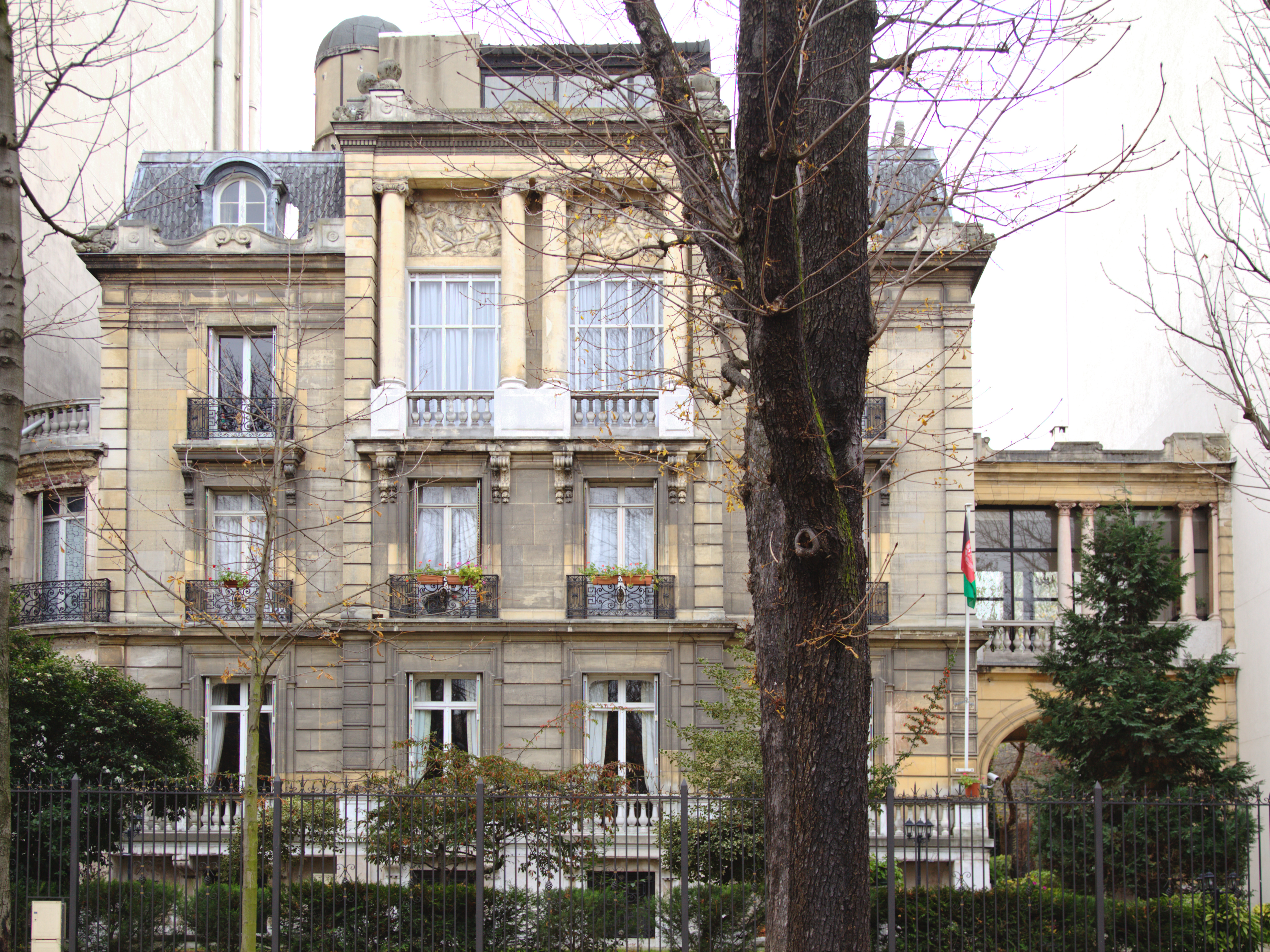 L'ambassade de l'Afghanistan à Paris, Avenue Raphael